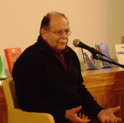 Walter Siti, Sala conferenze Biblioteca Delfini, Modena